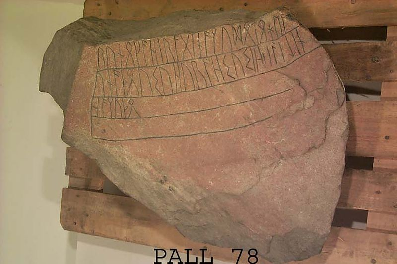 Nolebystenen.